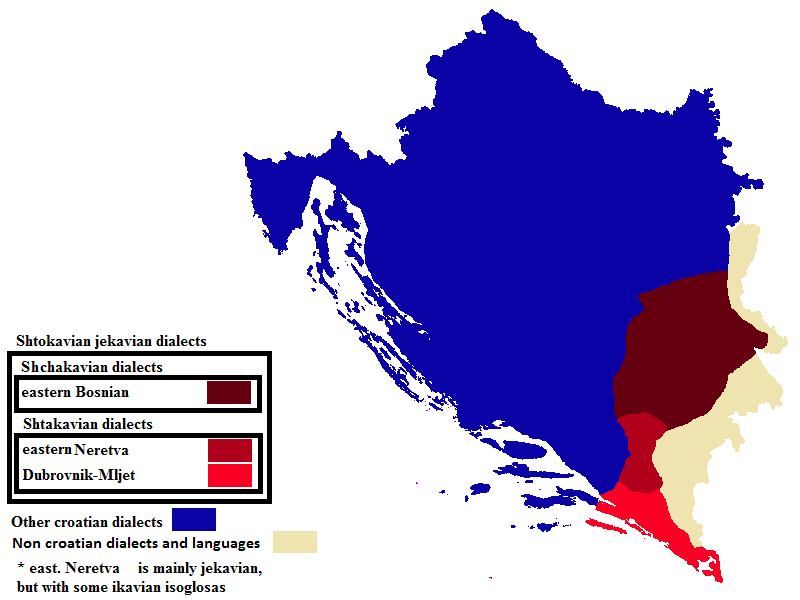 Prikaz povijesnih zapadnoštokavskih jekavskih dijalekata; 1 šćakavskog (istočnobosanski) 2 štakavska (istočno Neretvansko-pelješki koji je ikavsko-jekavski i Dubrovačko-Mljetski). Na karti je prikazana i Boka, s obzirom da je taj dijalekt tu autohton.